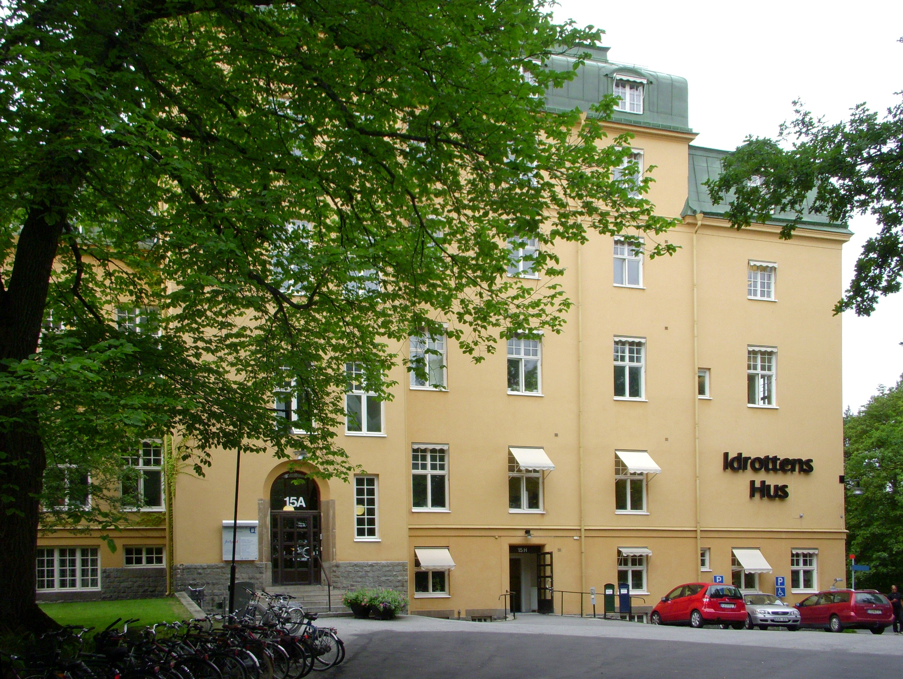 Byggnaden f.d. "Allmänna BB", Östermalm, Stockholm